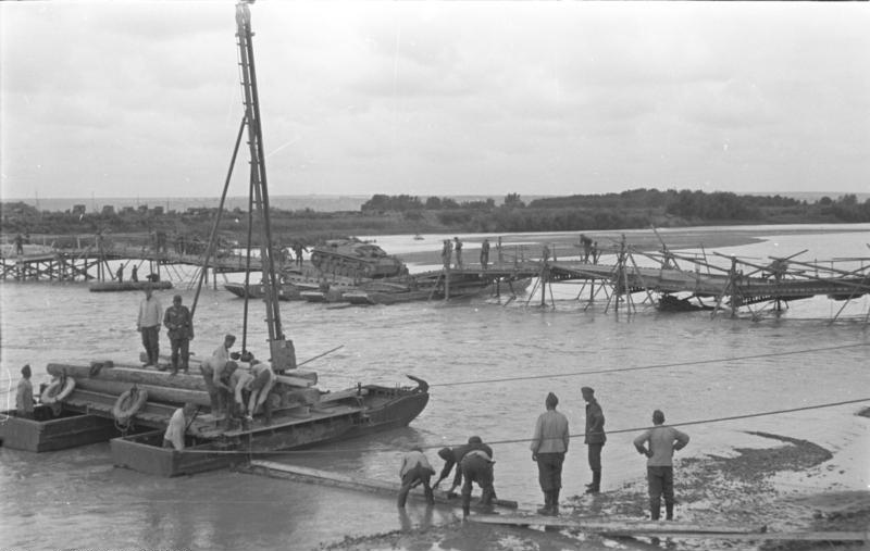 Brückenbau über den Pruth Sturmgeschütze überqueren sie